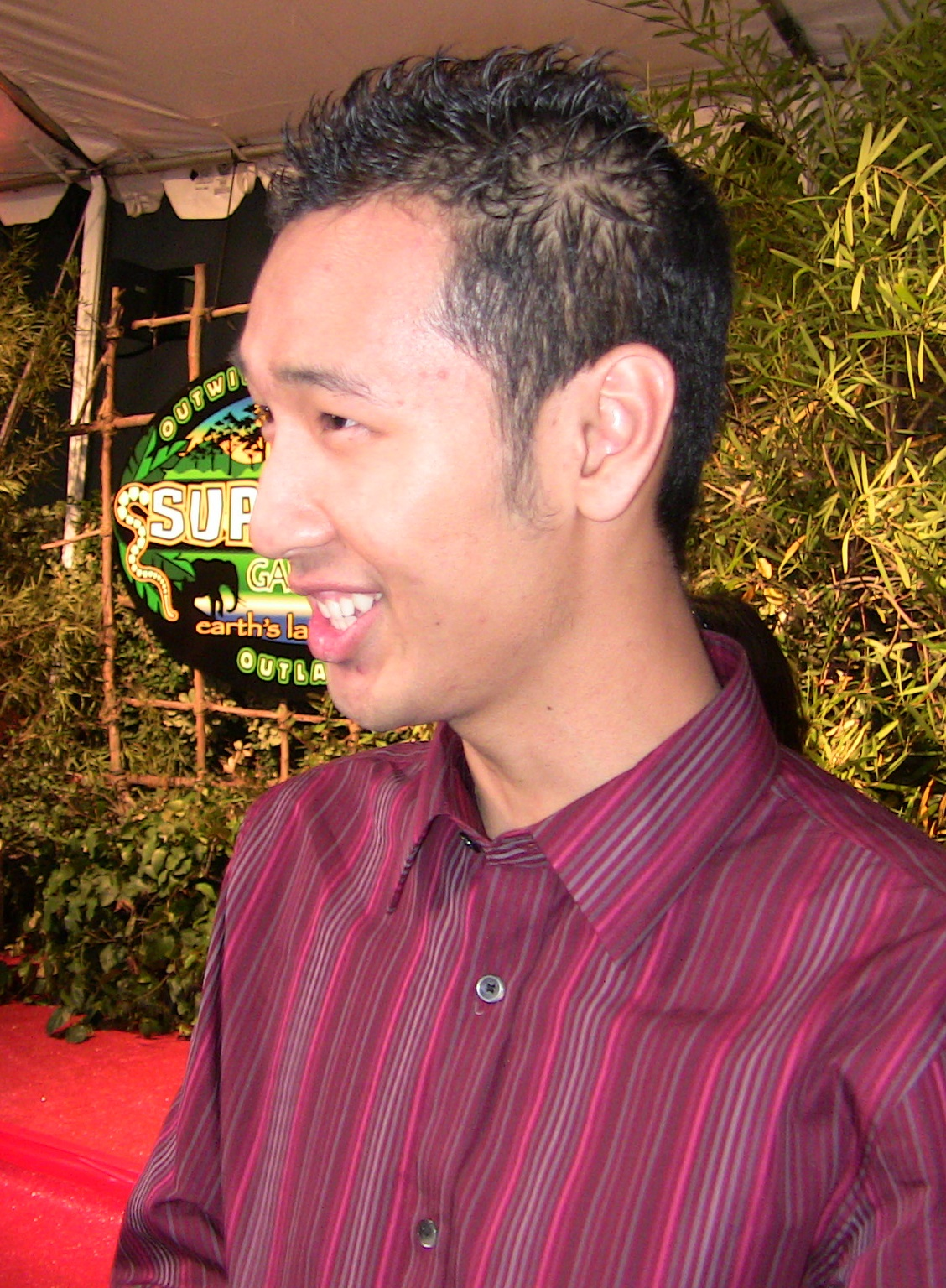 Survivor Finale, CBS Studios, Los Angeles, Calif. - Dec. 14, 2008